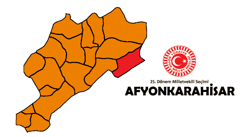 2015 genel seçim sonuçları